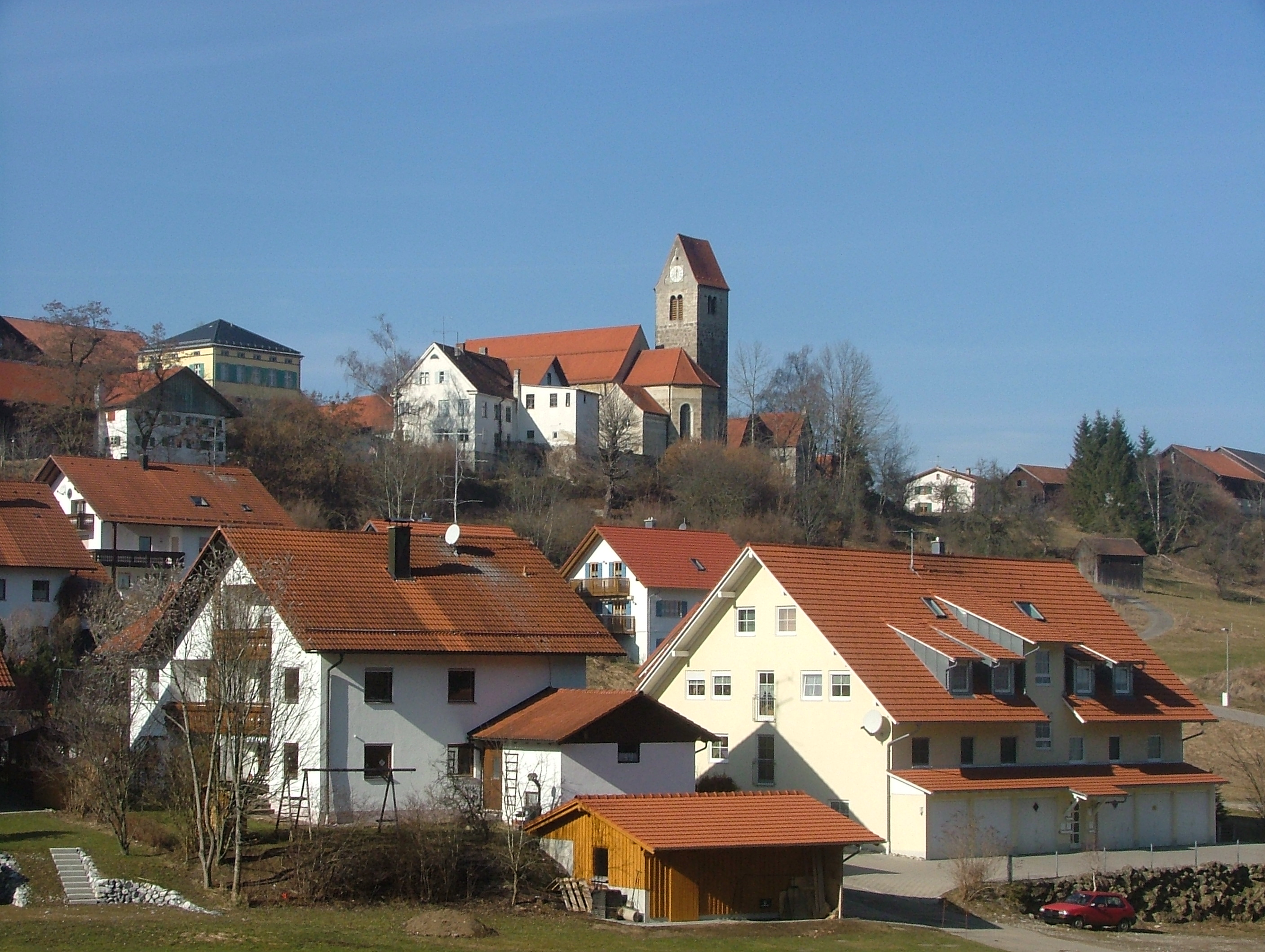 Böhen, Günztal, Westgünz